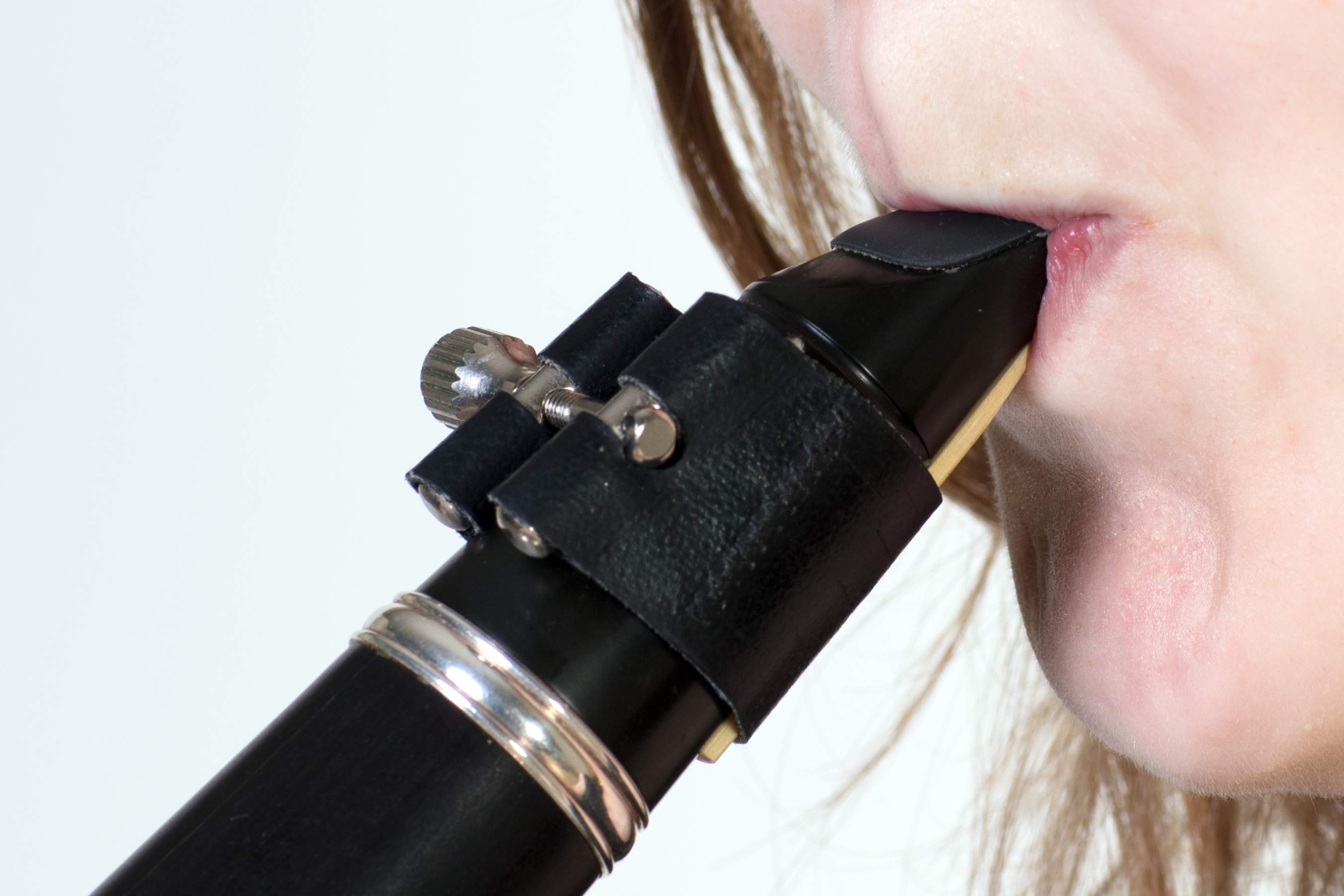 Das Spielen einer B-Klarinette.